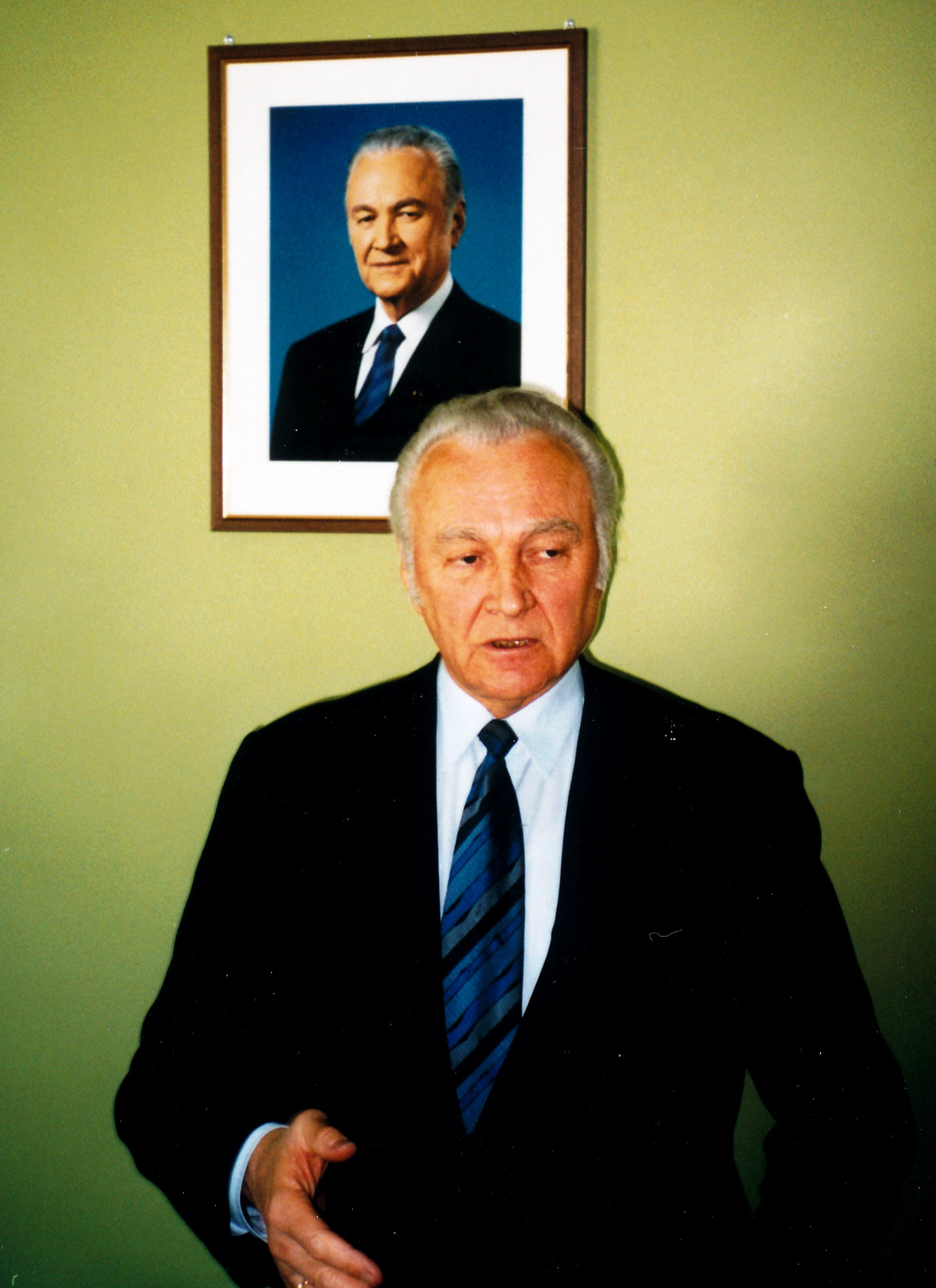 Arnold Rüütel 26.4.2004 Vasknarva piirivalvekordonis